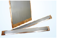 Flachtargets für TFT-LCD-Beschichtungen